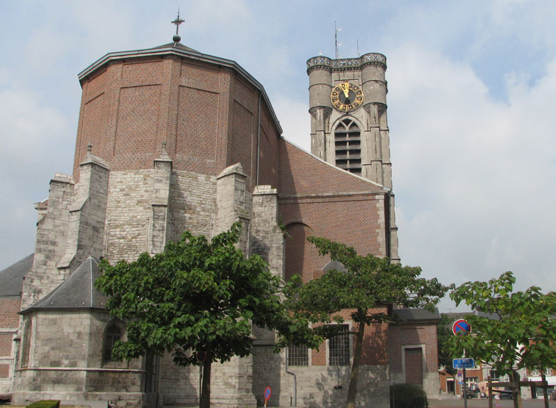 Eglise St Julien d'Ath Photo personnelle faite le 22 août 2006 Libre de droits